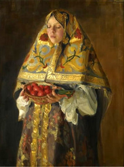 Художник Иван Куликов (1875-1941)